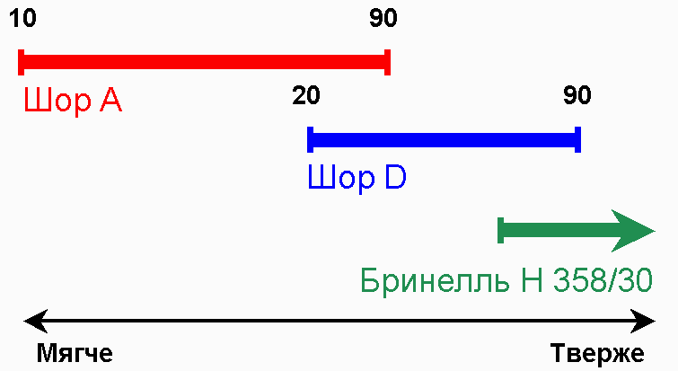 Примерноее соотношение шкал твёрдости Шора A, B и Бринелля H 5/358/30 (ГОСТ 4670-91, DIN 53456)